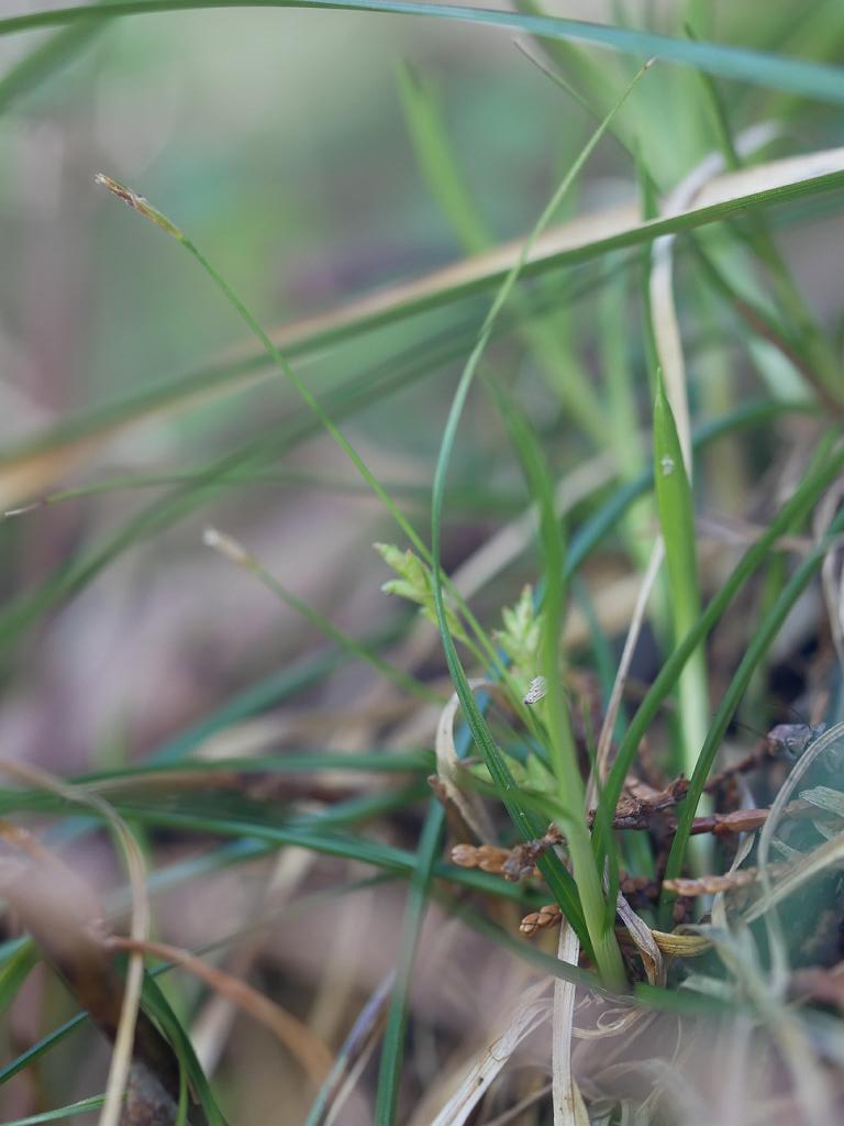 2019/05/08 静岡県富士宮市：Hujinomiya City, Shizuoka Pref. Japan